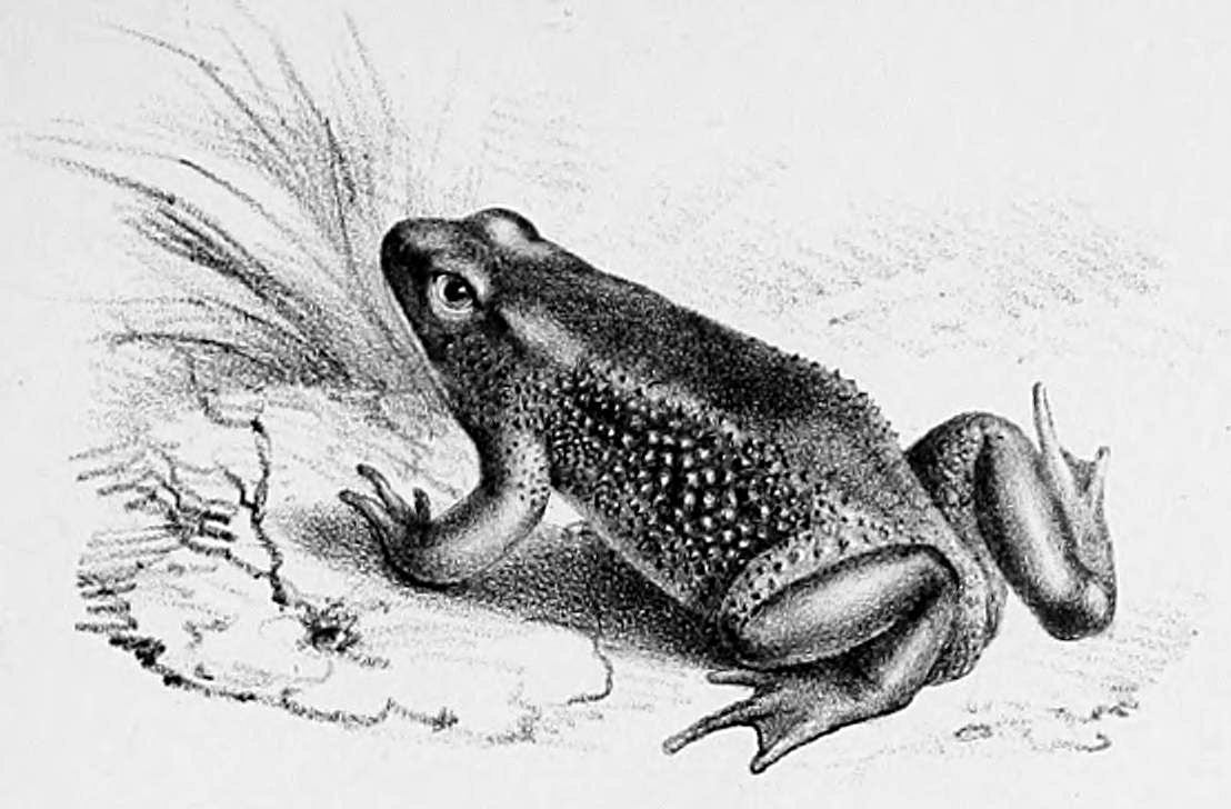 Atelopus ignescens Bon fichier, ma première importation était incorrecte.